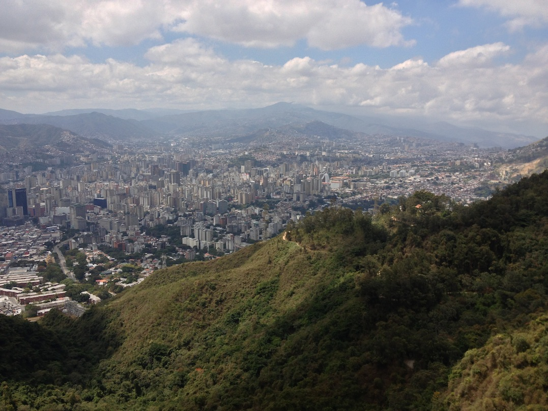 Subiendo en teleférico